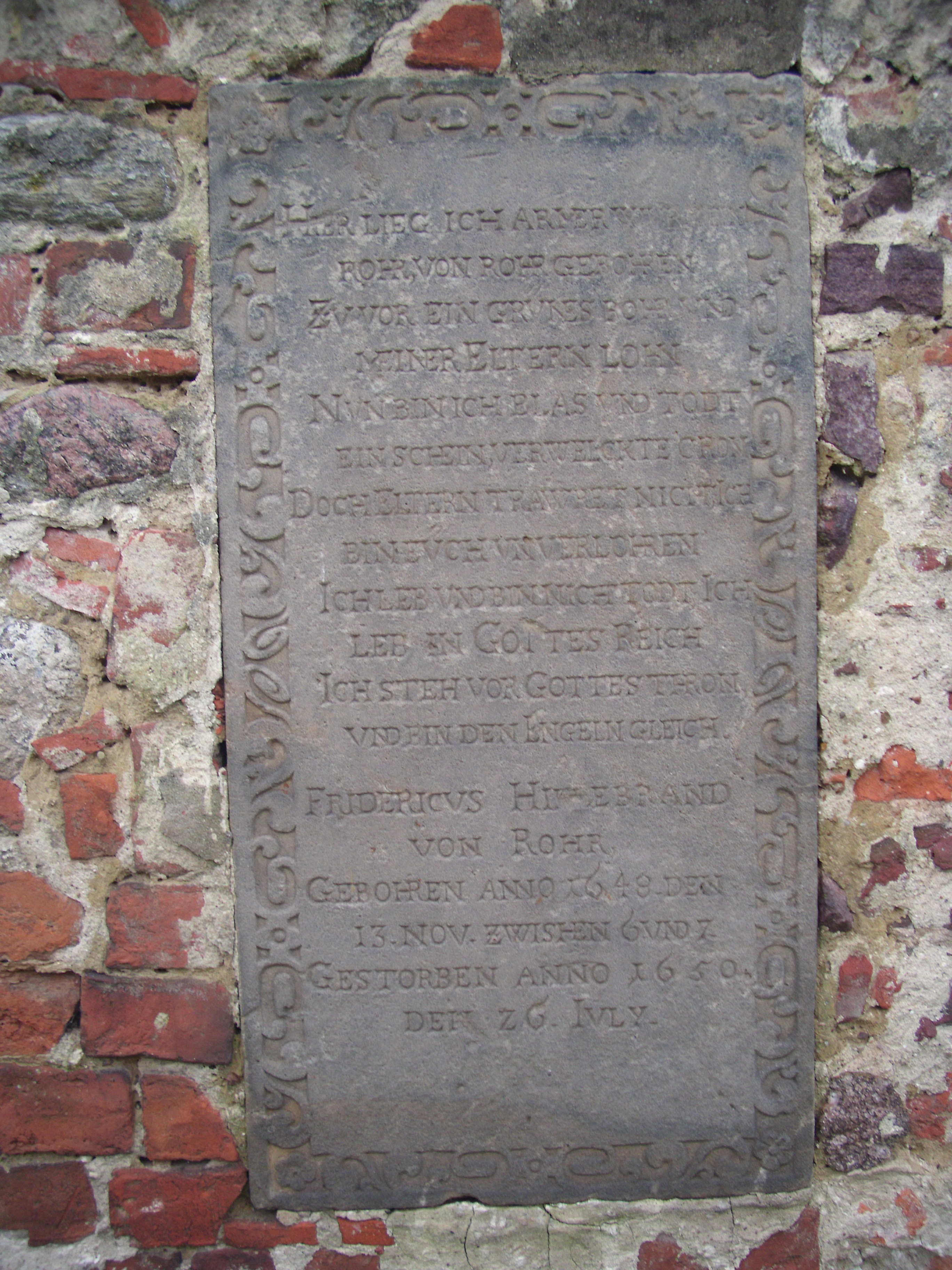 Grabplatte an der Kirche, Familie von Rohr Ragow, Gemeinde Ragow-Merz im Landkreis Oder-Spree, Brandenburg